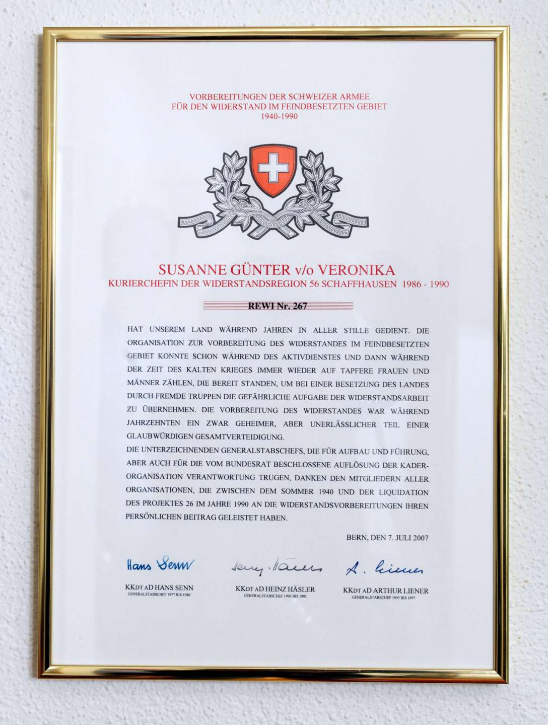 Urkunde für Susanne Günter v/o Veronika